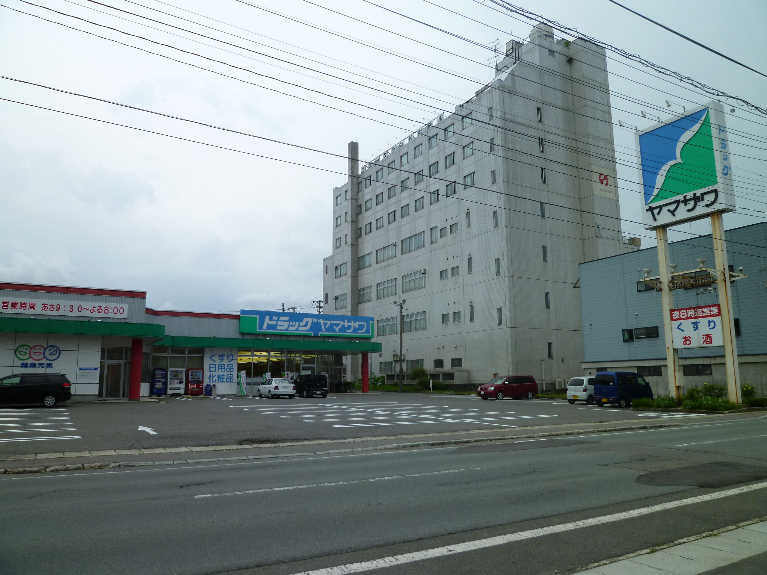 株式会社ヤマザワ薬品 ドラッグヤマザワ新庄店。 山形県新庄市若葉町に所在。